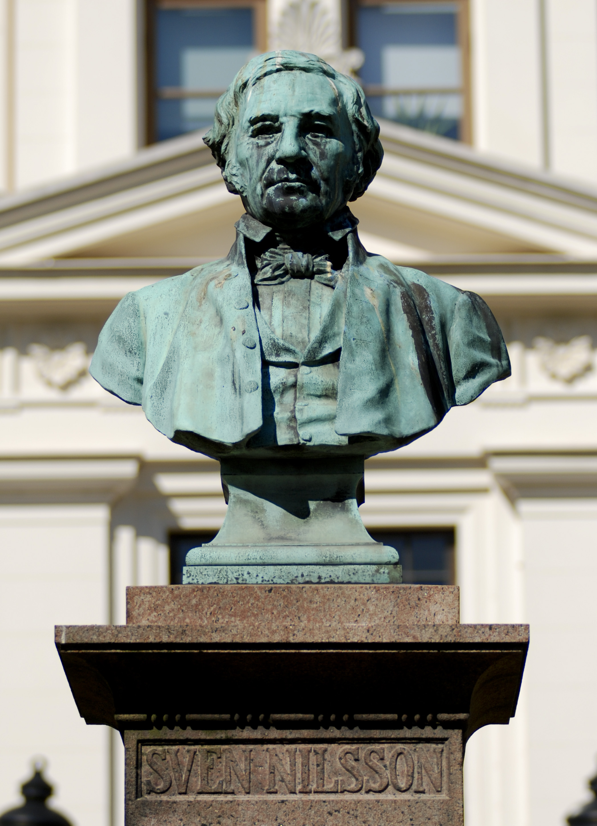 Byst av Sven Nilsson i Lundagård skapad av Walter Runeberg efter förlaga av Ida Nilsson